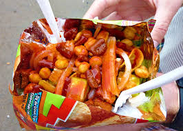 Los dorilocos son una botana inventada en México la cual se hizo famosa a finales del año 2013 principalmente en el Distrito Federal. Su ingrediente principal son las conocidas botanas Doritos en sus diferentes presentaciones de sabores de la comercializadora Sabritas. Son preparadas con zanahoria rayada, jicama rayada, pepino rayado o cortado en cuadritos, jitomate en rodajas, cueritos, granos de elote enlatado, cacahuates acompañados con salsa chamoy, salsa valentina, miguelito y limón al gusto. Se puede preparar con todos estos ingredientes o sólo con algunos, dependiendo del gusto de la persona y lo que ofrezca el vendedor.